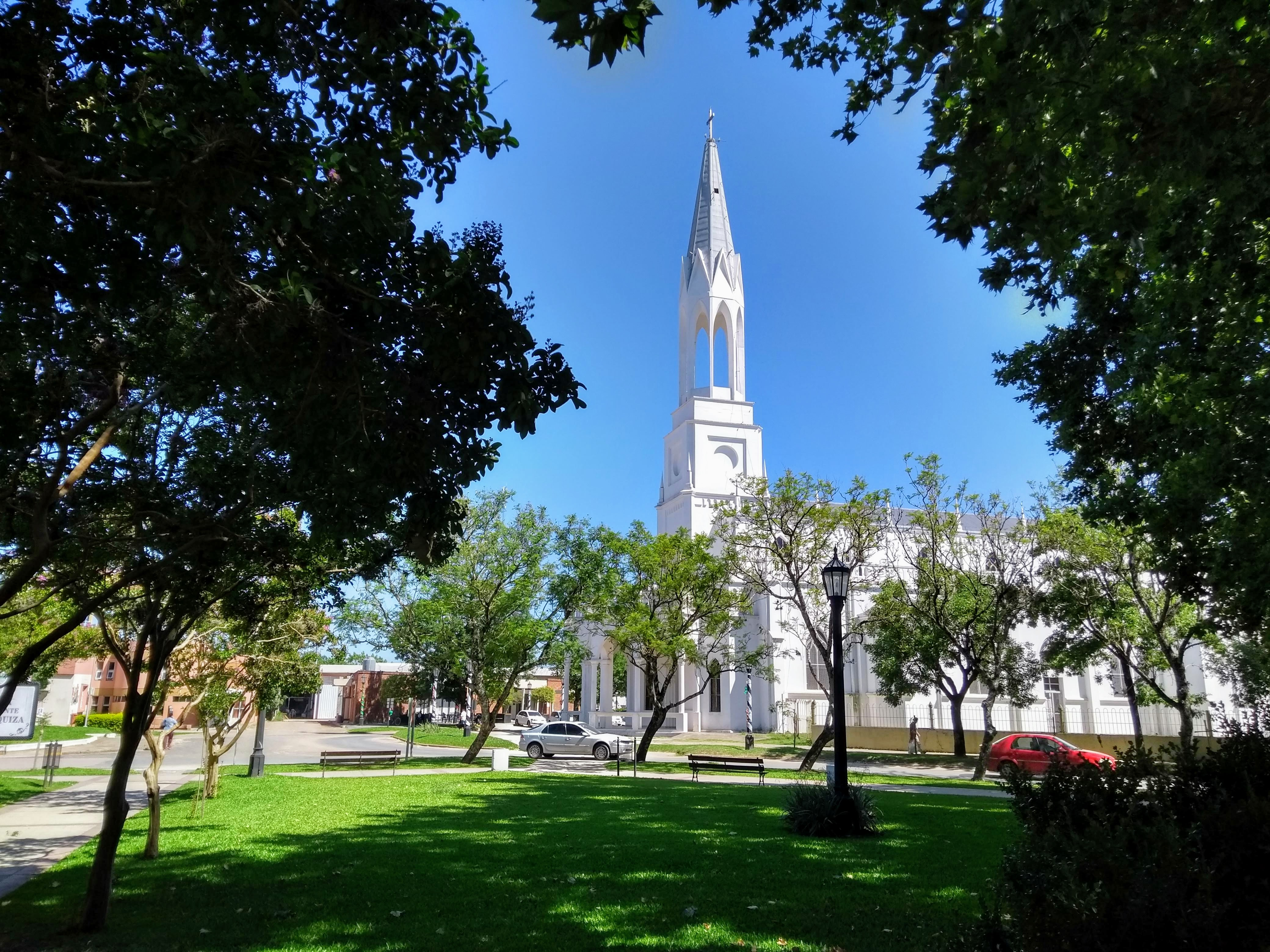 Parroquia "Natividad de Nuestra Señora" (comúnmente llamada "Virgen Niña") de la ciudad de Villa Elisa, Provincia de Entre Ríos, en diciembre de 2018.